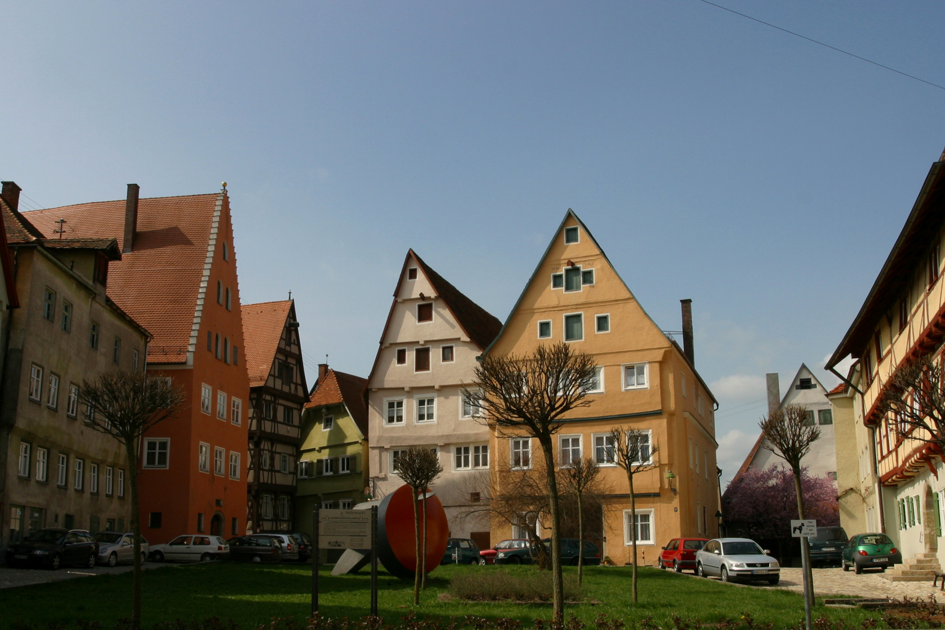 Picture from Nördlingen (Bayern) Hafenmarkt